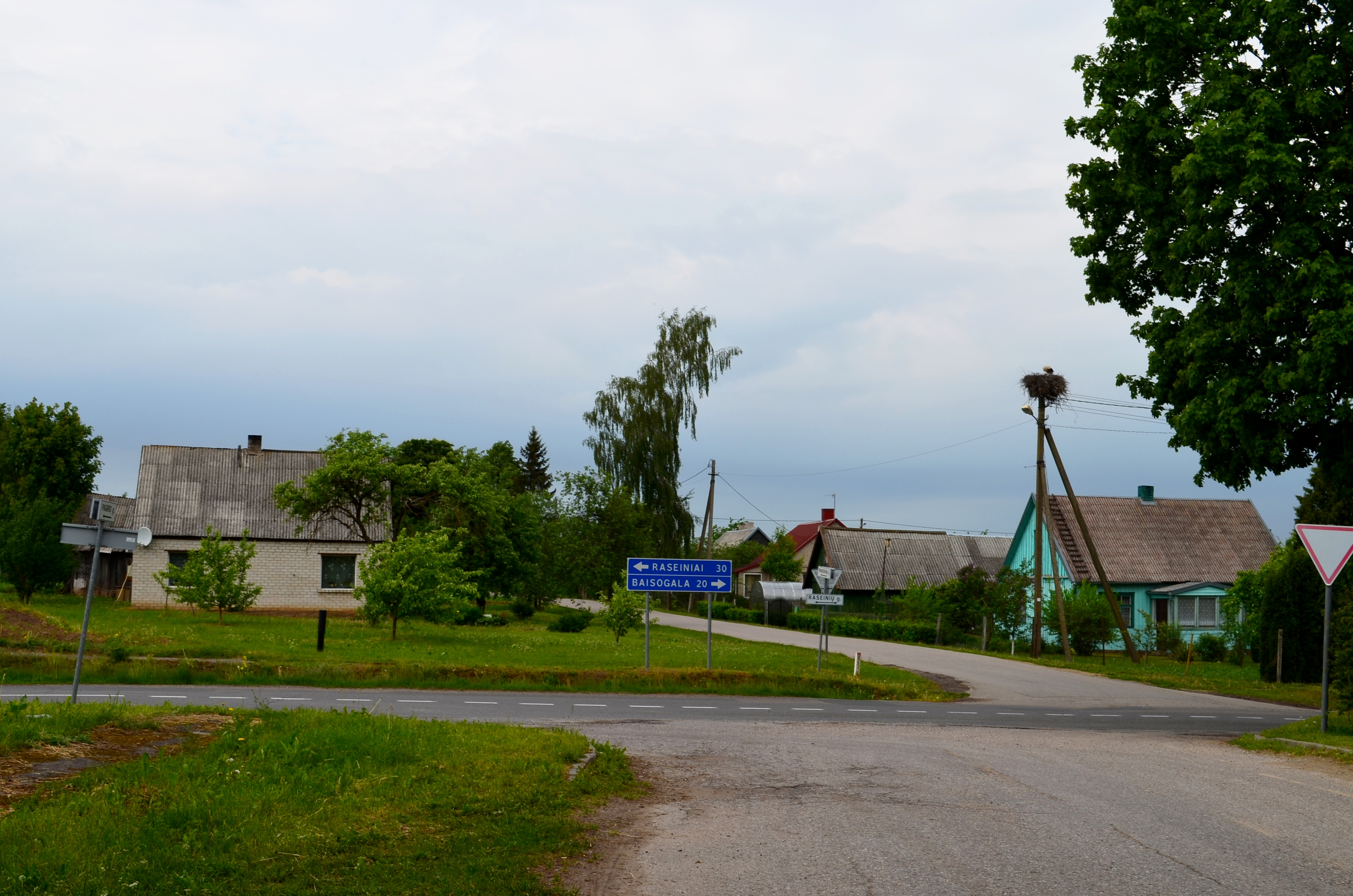 Dievogala, Raseinių r.